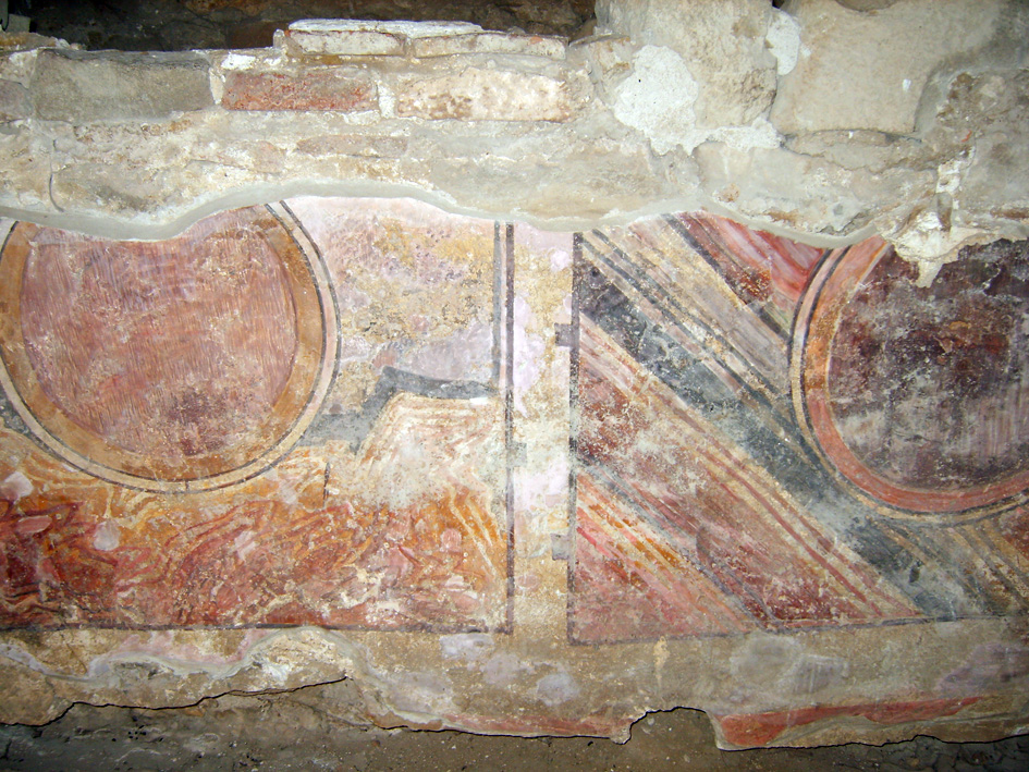 Рисуван цокъл от църквата "Свети 40 мъченици", Търново, 13 век